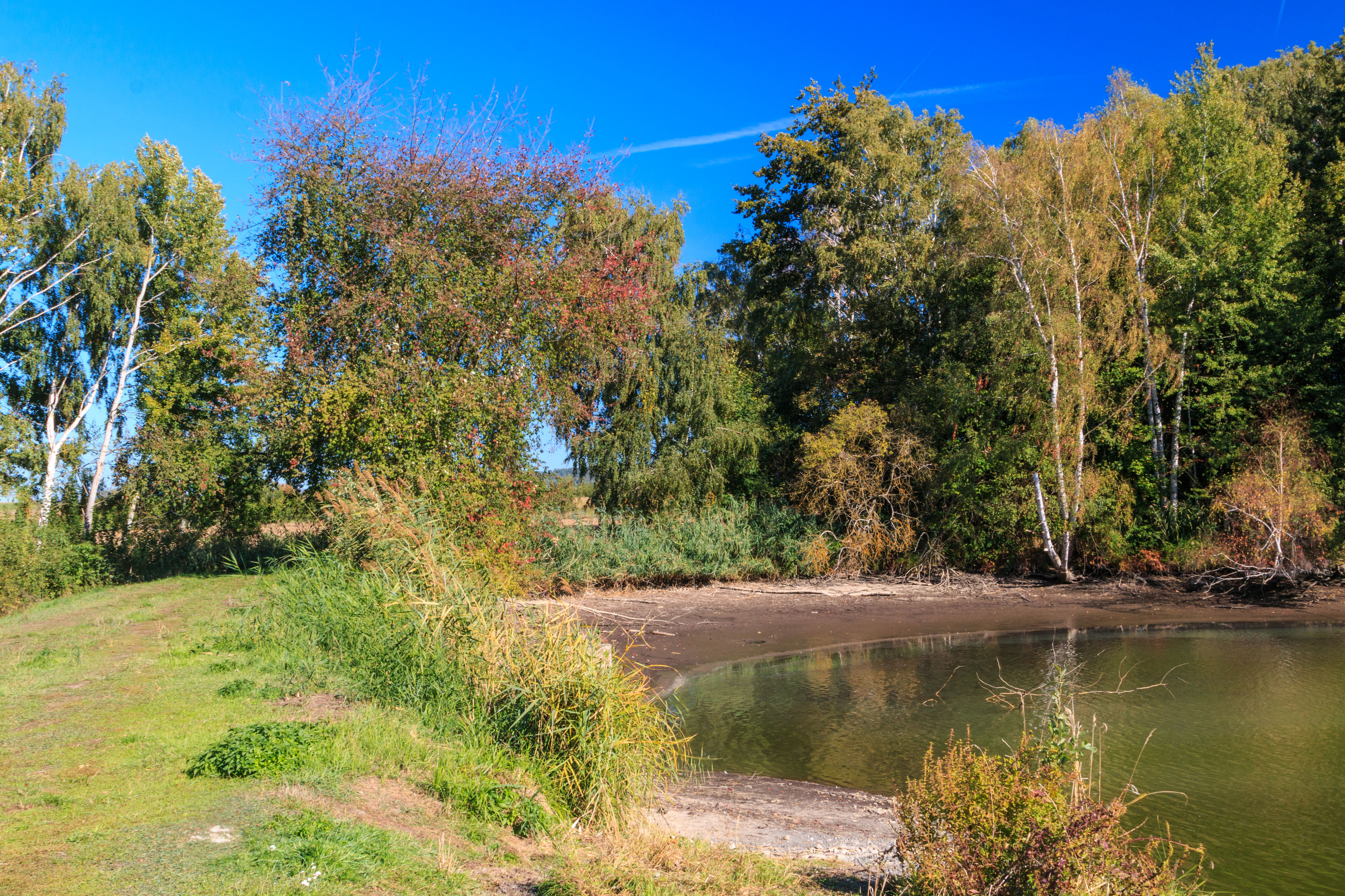 Rybník Dolní Střípek Project: Vodstvo.